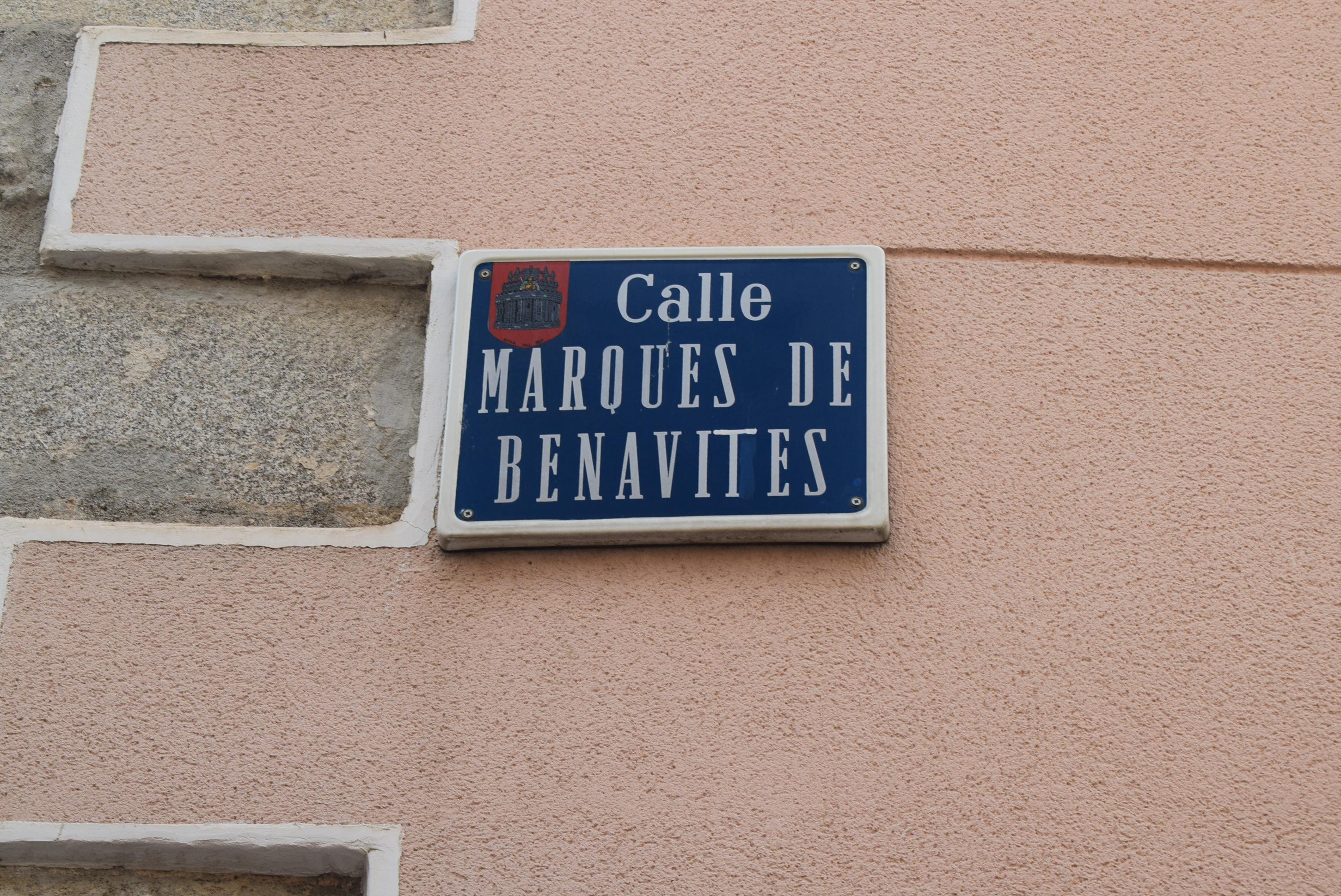 Señal de la calle dedicada al marqués de Benavites, Exmo. Sr, don Bernardino del Megar y Abreu, en el casco histórico de Ávila, España